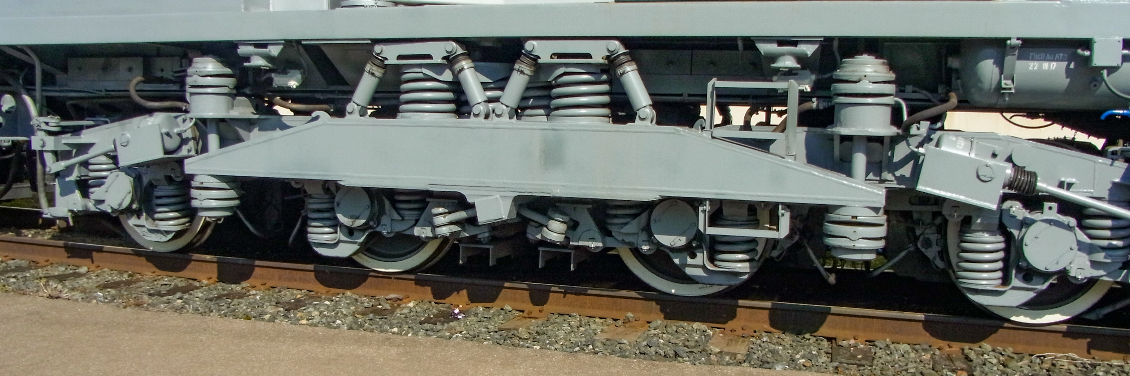 Задняя тележка бустерной секции газотурбовоза ГТ1h-002